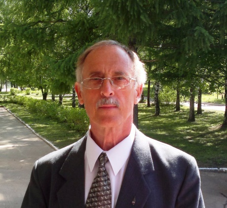 Художник, Кирово-Чепецк